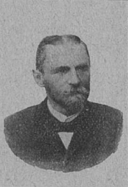 Bedřich Kancnýř (1851-1940), rakouský právník a politik z Moravy; poslanec Moravského zemského sněmu